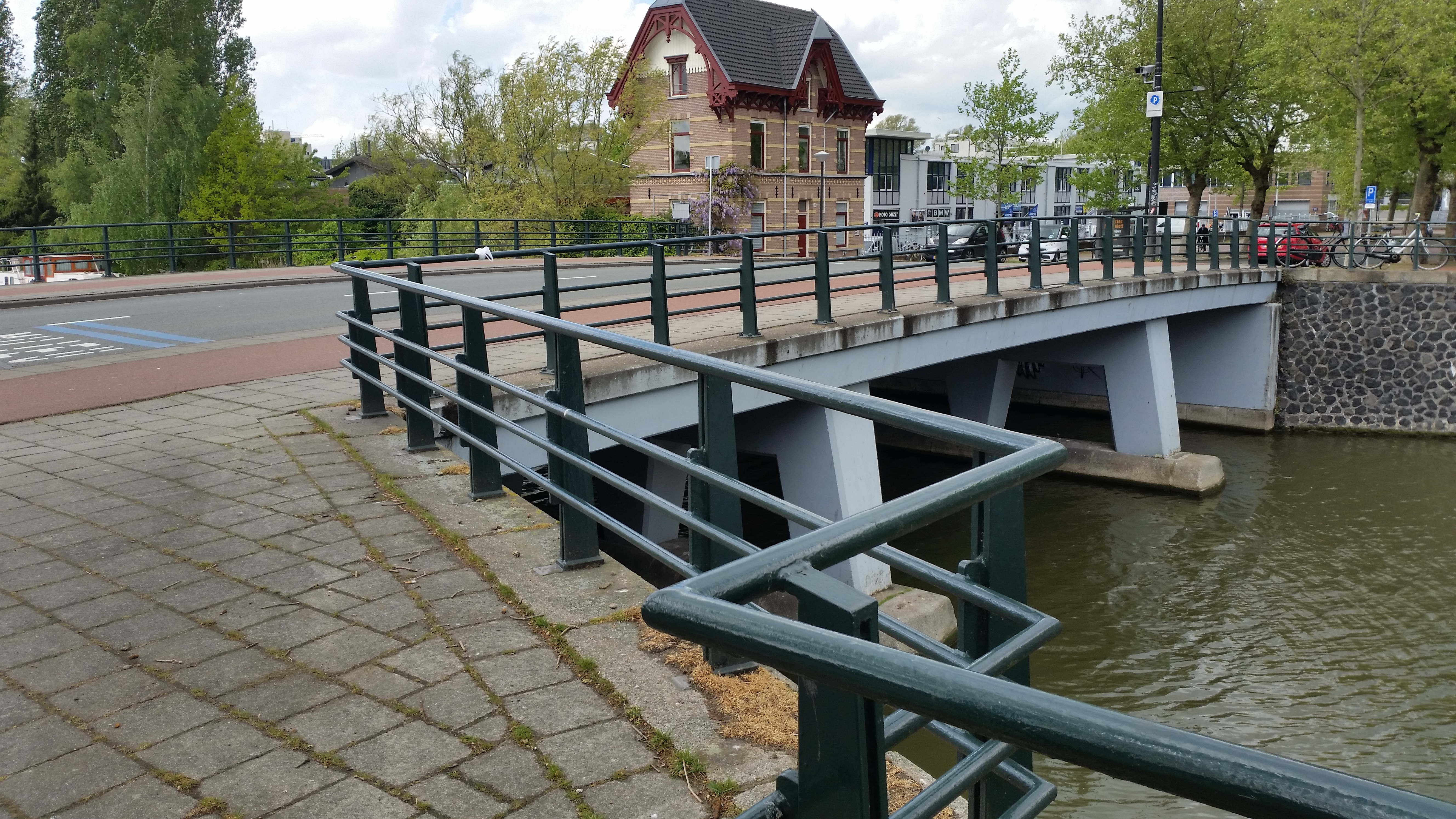 Impressie van de Slachthuisbrug (brug 262) in de Veelaan, Amsterdam Oost (april 2020